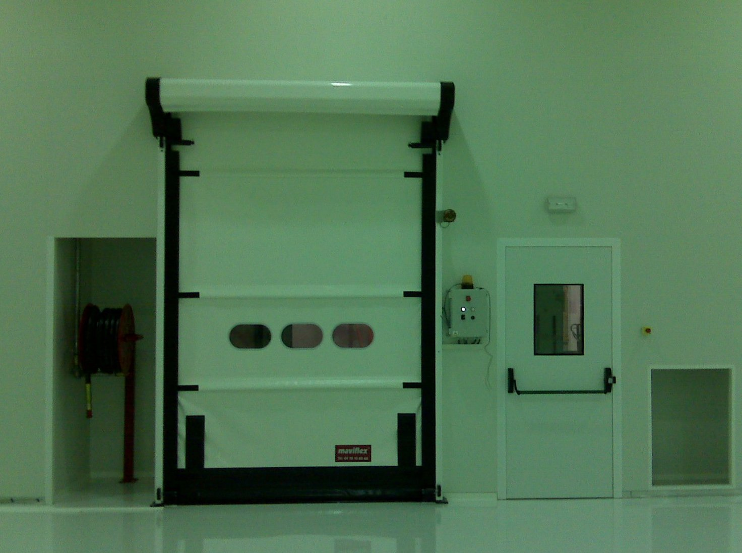 Porte souple rapide pour salle blanche.